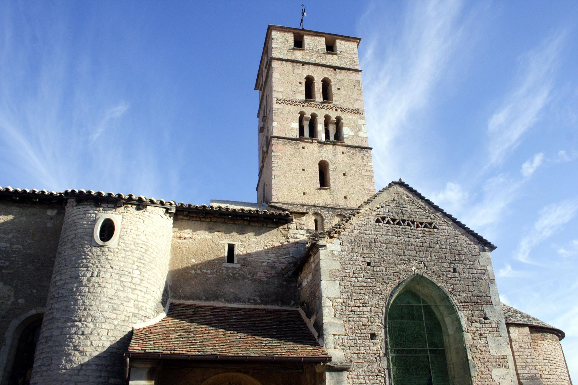 Église romane Saint-Pierre, Uchizy, Saône et Loire, Bourgogne, France